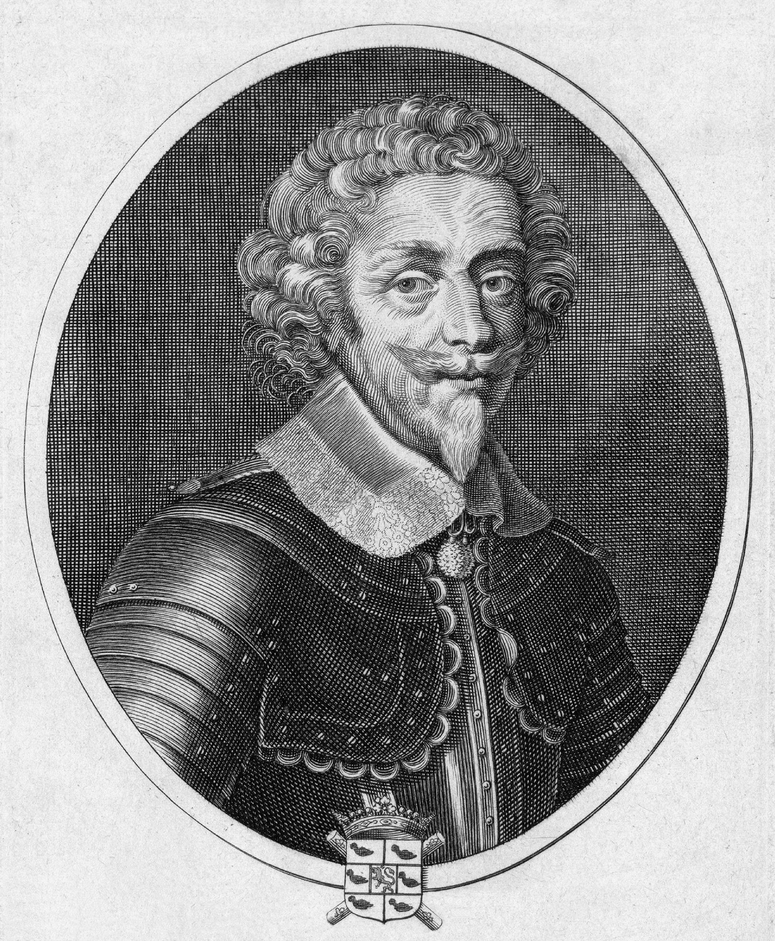 Stich mit dem Porträt des französischen Marschalls Louis de Marillac